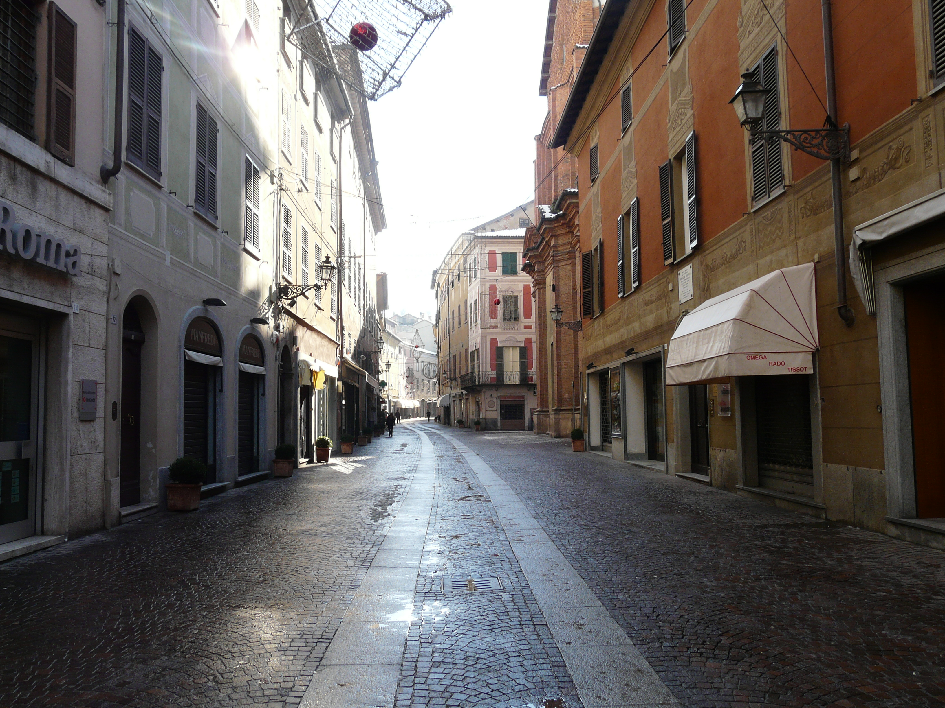 Centro storico di Novi Ligure, Piemonte, Italia